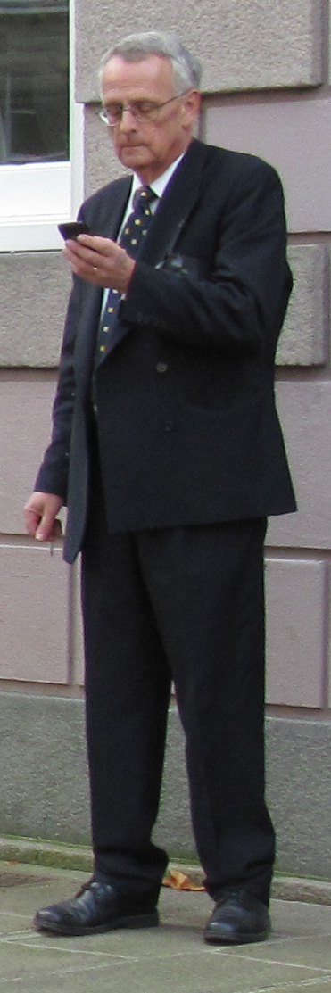 Nrf: Dans l'Vièr Marchi, Saint Hélyi, Jèrri: lé 14 dé Novembre, juste dévant l'assèrmentâtion des Membres d's Êtats dans la Cour Rouoyale.